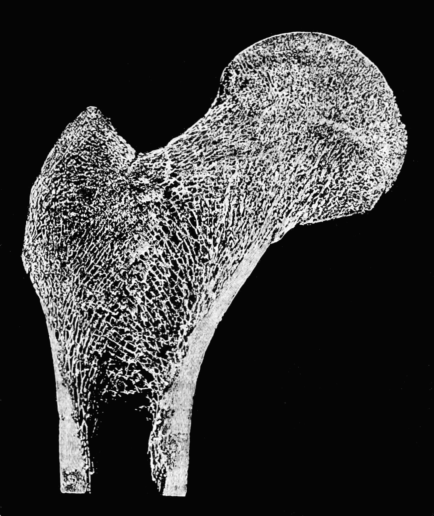 Femur fibre arrangement for strength